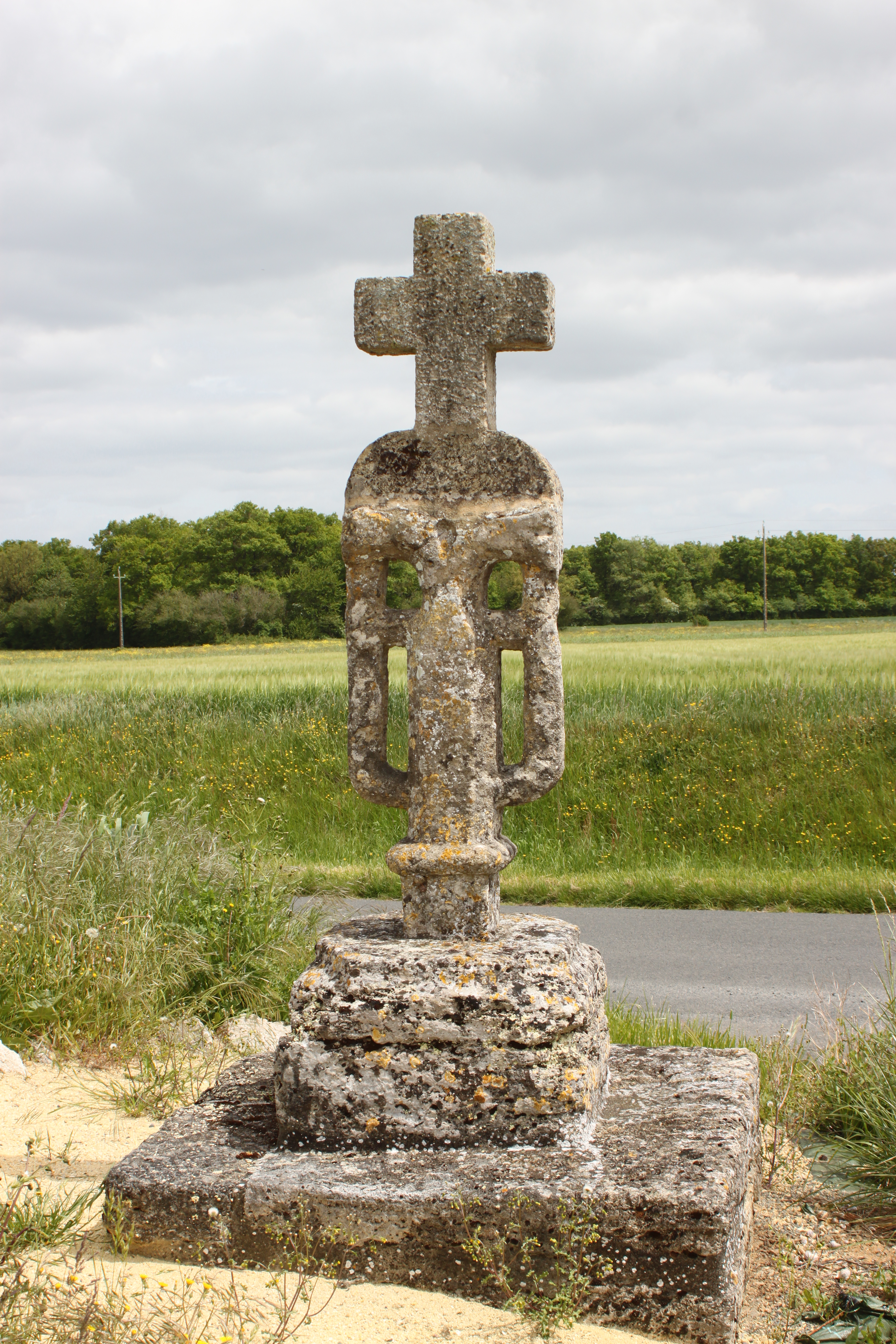 Croix de la Grézille (face nord), Fr-49-Ambillou-Château.